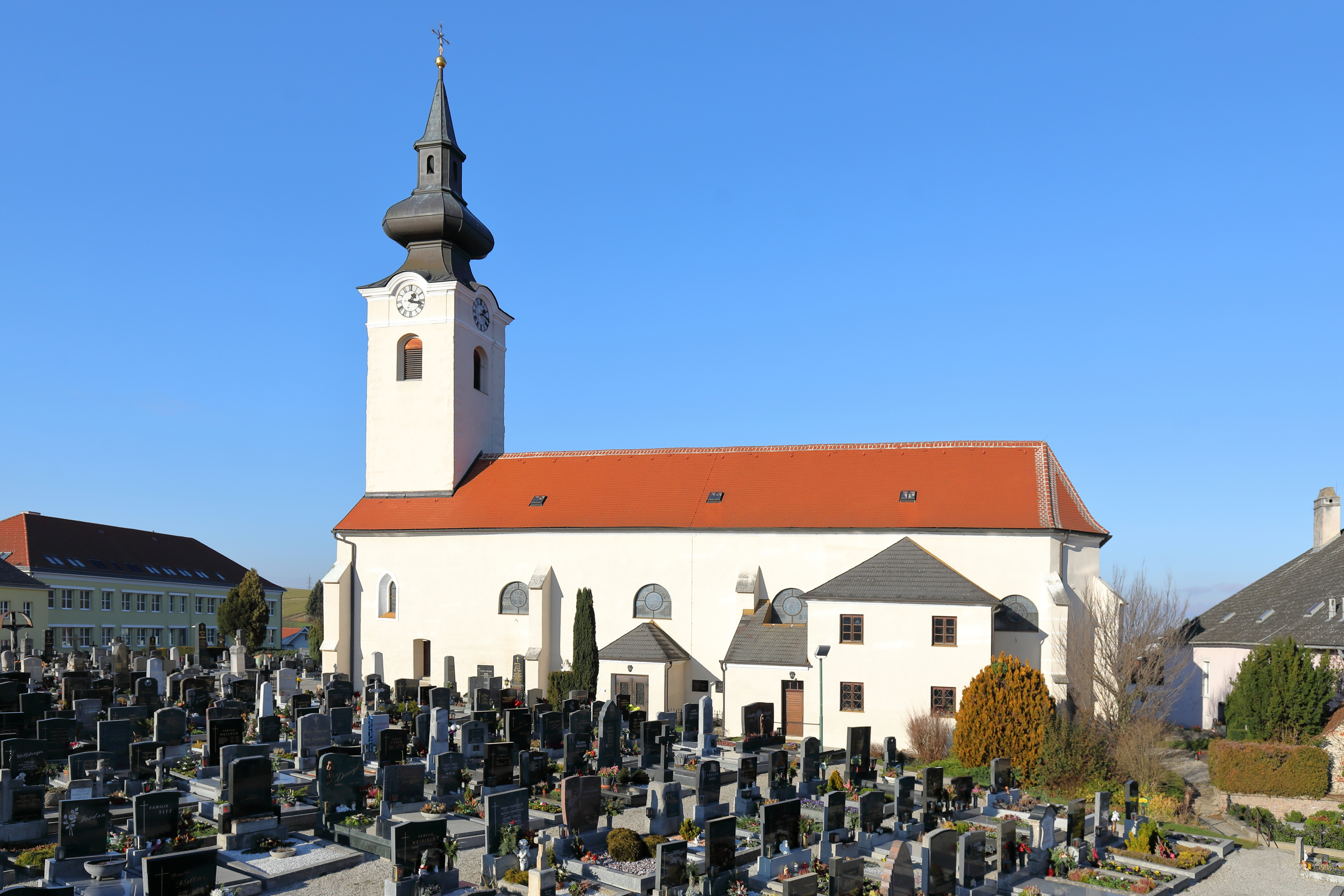 Südsüdostansicht der röm.-kath. Pfarrkirche Pfarrkirche hl. Margaretha in der niederösterreichischen Marktgemeinde Sieghartskirchen.Die Kirche ist auf einer Anhöhe errichtet und von einem Friedhof mit Befestigungsmauer umgeben. Die im Kern spätromanische und gotisch überbaute Saalkirche hat einen mächtigen romanischen Westturm sowie einen polygonal geschlossenen Chor.